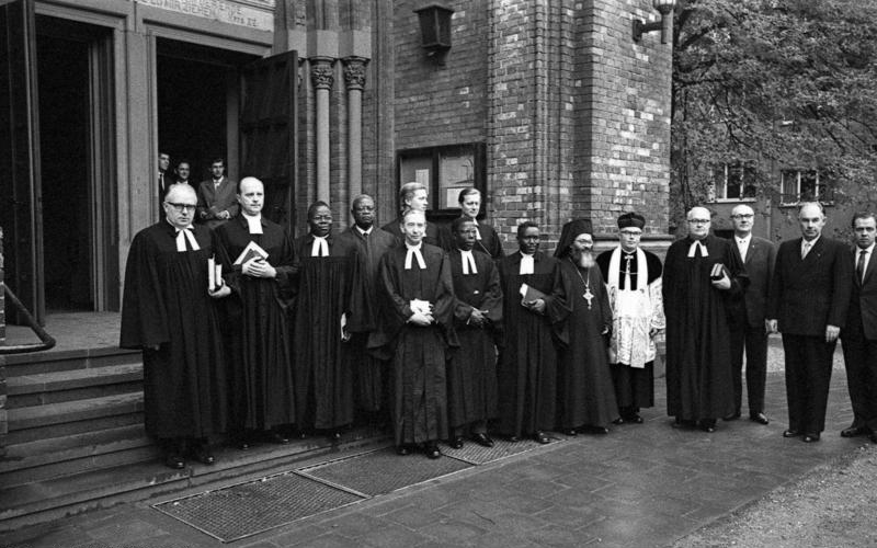 Gottesdienst für ökumenische Persönlichkeiten